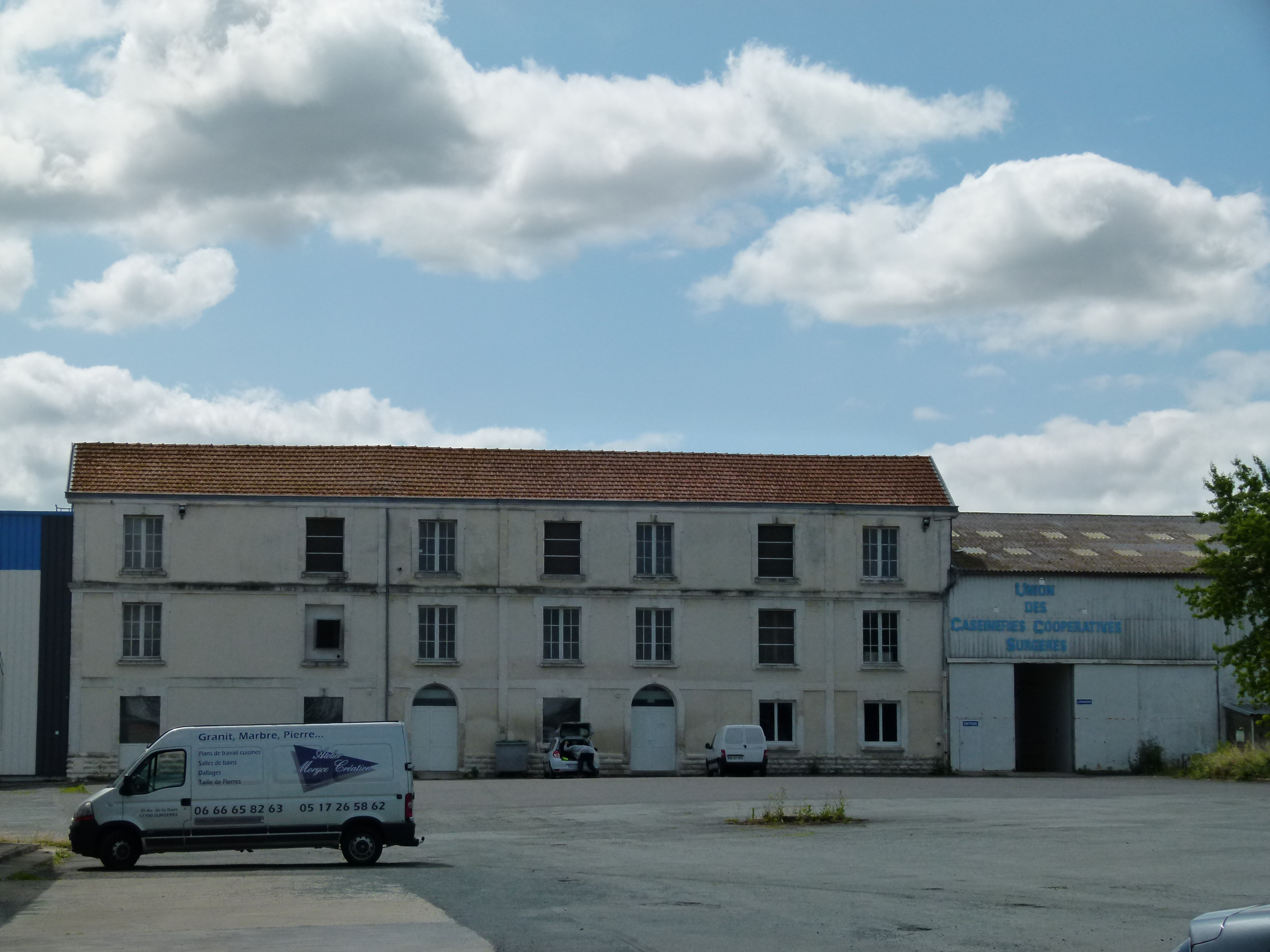 La caséinerie coopérative de Surgères occupe un ancien bâtiment industriel datant d'avant la Première Guerre mondiale.